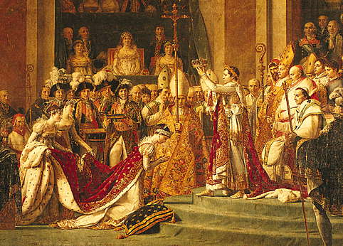 Napoleon och Josephine kröntes till fransmännens kejsare resp. kejsarinna i Notre-Dame i Paris den 2 december 1804. Del av målning av Jacques Louis David 1805-1807. På bilden syns Napoleon sätta kronan på kejsarinnan Joséphine efter att själv ha placerat sin egen kejsarkrans på sitt huvud. Ceremonin övervakas av påven som för ändamålet rest dit från Rom. På stolen i bildens övre del syns Napoleons mor, Letizia, trots att hon inte närvarade. Napoleon hade beordrat David att måla dit henne.